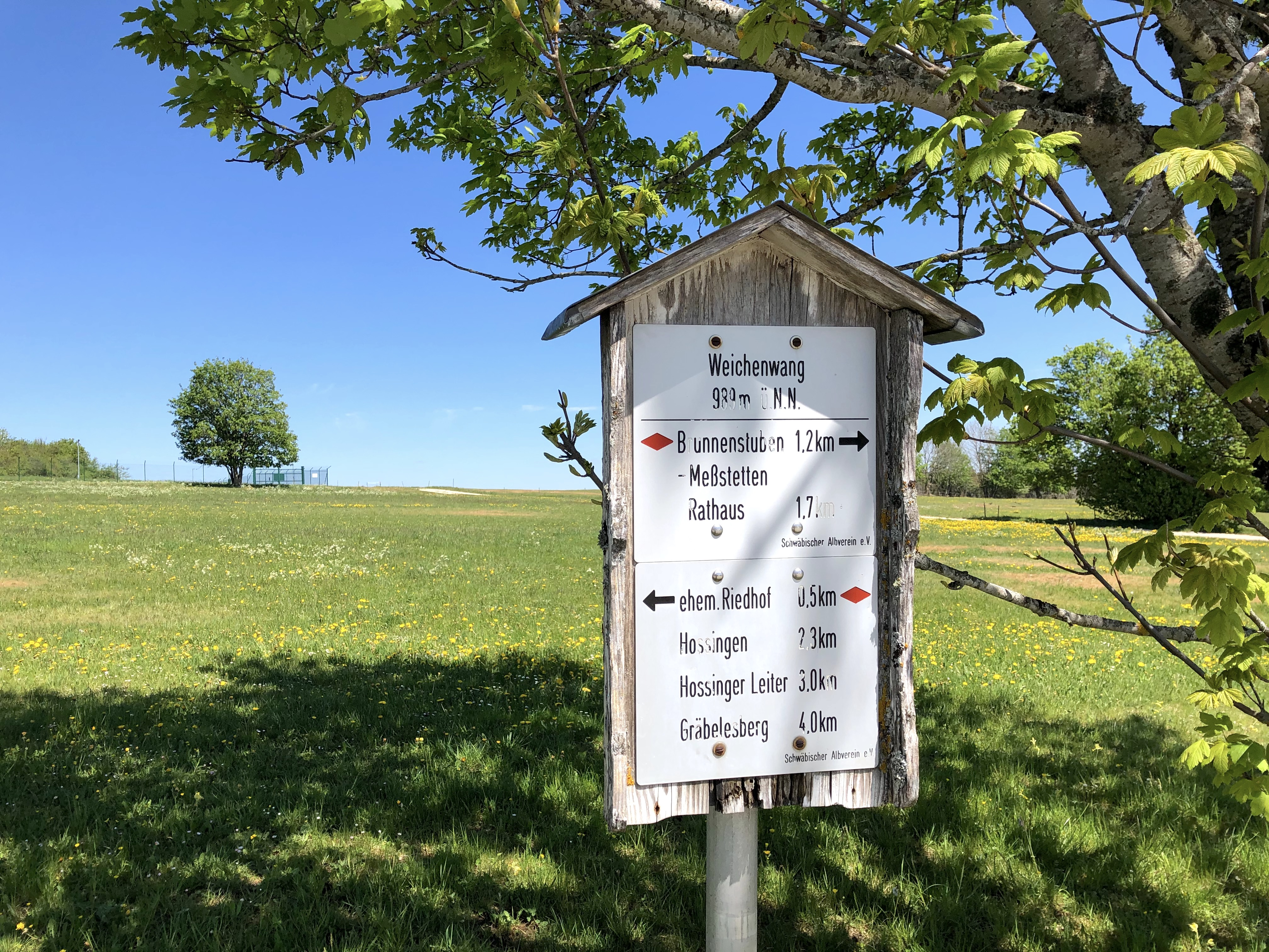 Weichenwang bei Meßstetten, Schwäbische Alb